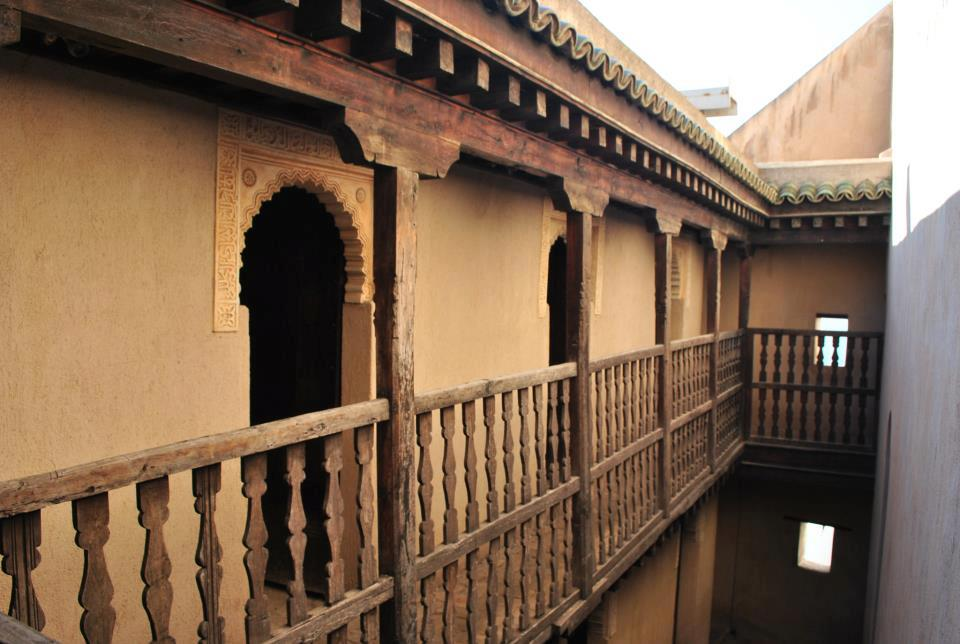 cellules médersa salé